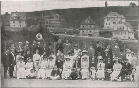 Die Teilnehmer am 1. Lawn-Tennis-Turnier in Tübingen, 1909. Unterste Reihe: sitzend, von links nach rechts: Frl. Lange, Sturm, Nagel, Stuttgart, Frl. Döderlein, München, Herr O. Kapff, Vorstand des T. C. T., Herr Leman, Würzburg. Frl. Nelböck, Heilbronn, Herr Dr. R. Nack, Würzburg, Frl. Lamparter, Stuttgart, Oberleutnant Münst, Frl. I. Scholl, Herr Lampe, Frl. Hartmann, Herr Gerlach - Mittlere Reihe: Herr Engelmann, O. Bühler, Frl. Mächtle, Herr Runde, W. Weiss, Frl. Mautz, Frl. Grützner, Herr Stengele, Frl. Kl. Scholl, Herr Kamps, Frl. Nelböck, Heilbronn, Wislicenus, Koken, Höhne, Ulm, Ott, Ulm, Wildermuth, Sippel, Dr. Schneider Knapp. - Oberste Reihe: Schilling, Jakob Götz, Schaller, Dr. Baumgarten, Harald Baumgarten, Freiherr von Rassler, Stuttgart, Bandau, W. Kapff, Frl. Schaller, Stuttgart, M. Fischer, Laquer, Dr. Grützner, Stengele, Markwort, Höfeld. Im Hintergrund die Zeppelinstraße (heute Payerstraße) und der Kaiser-Wilhelm-Turm (heute Österbergturm).